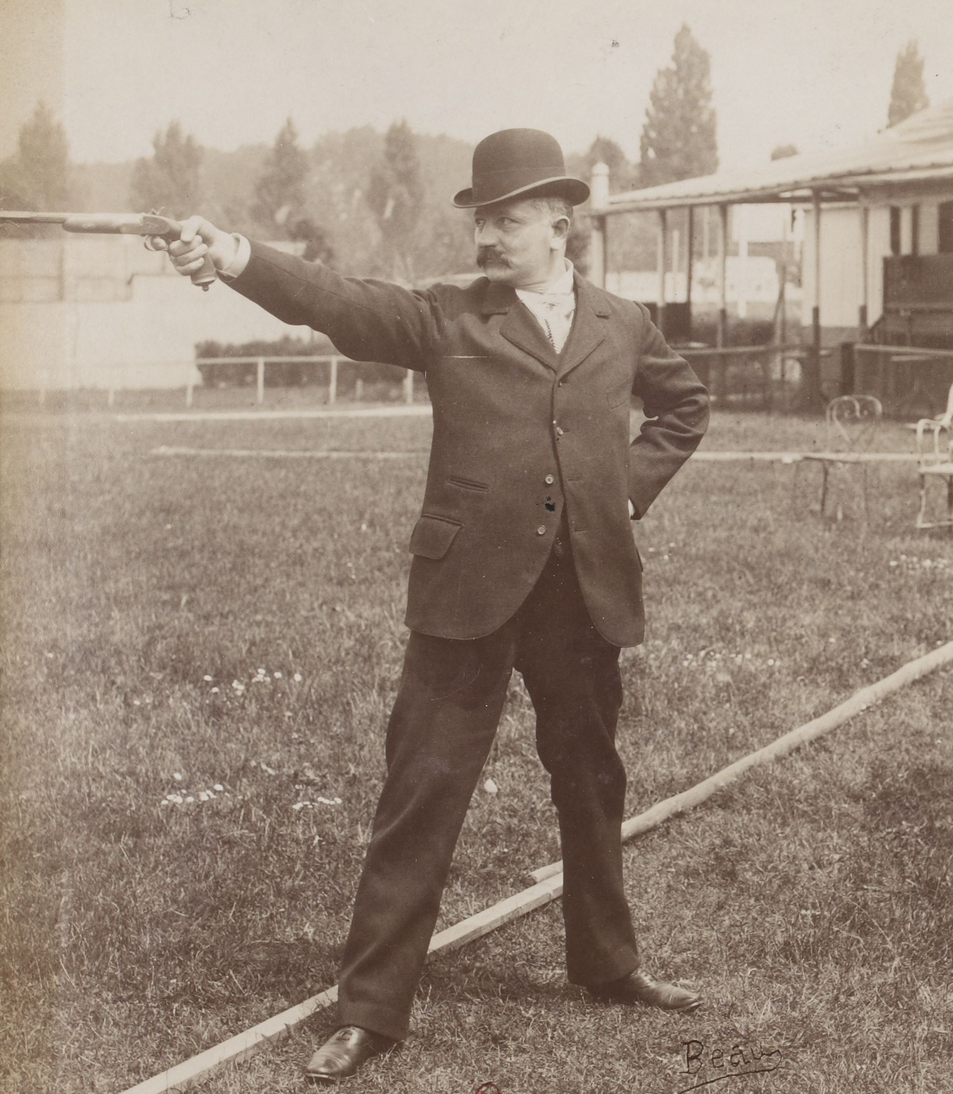 [Collection Jules Beau. Photographie sportive] : T. 7. Année 1898 / Jules Beau : F. 9v. [Tir aux pigeons de l île Séguin, concours de tir de la société Le Pistolet, juin 1898] ; Léon Lécuyer, vainqueur du concours ; [Jules] Beau